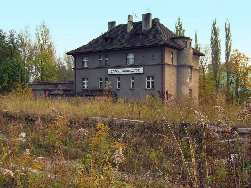 Železniční stanice Zabrze Mikulczyce, Polsko